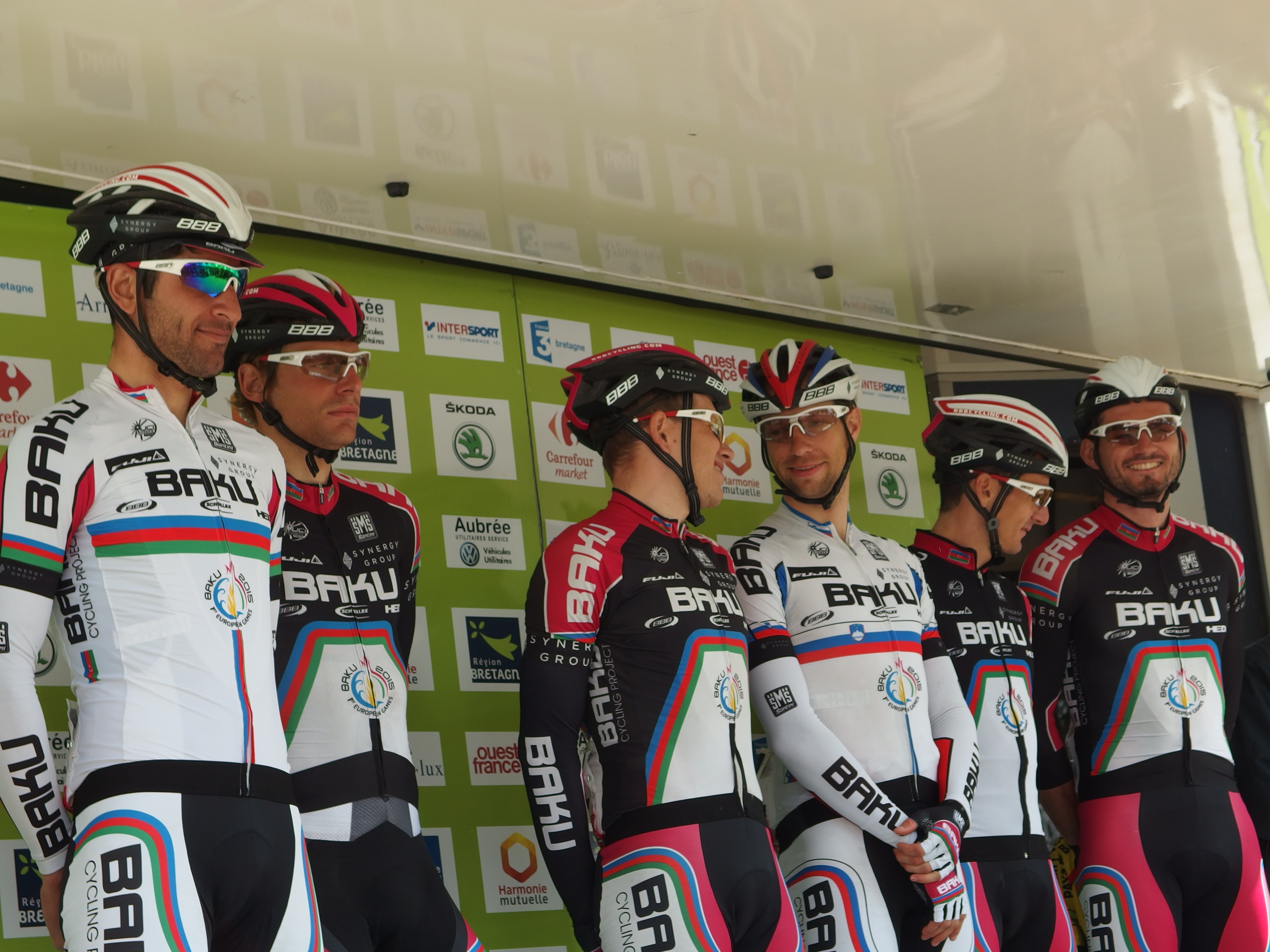 Tour de Bretagne 2015 - Présentation des équipes au départ de la troisième étape à Baud - Équipe Synergy Baku Project Depicted people: Elchin Asadov, Dennis van Winden, Oleksandr Surutkovych, Matej Mugerli, Ioannis Tamouridis and Maksym Averin